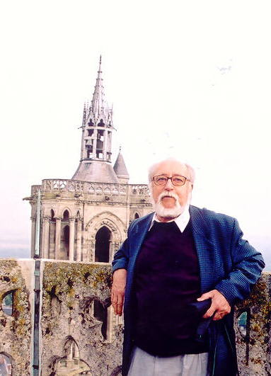 Daniel Lefèvre Auteur : Dominique Natanson